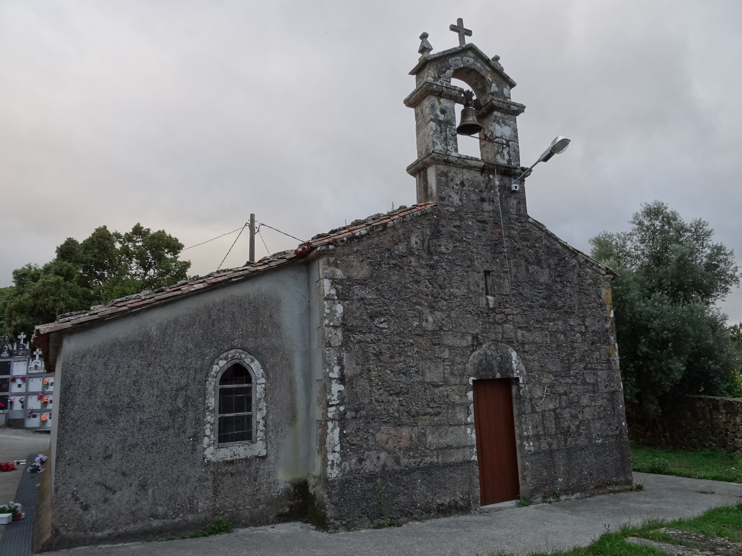 Igrexa de Rairiz no concello de Santiso, provincia da Coruña.